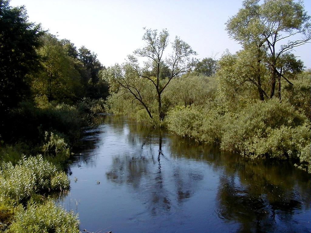 Misa River, Latvia